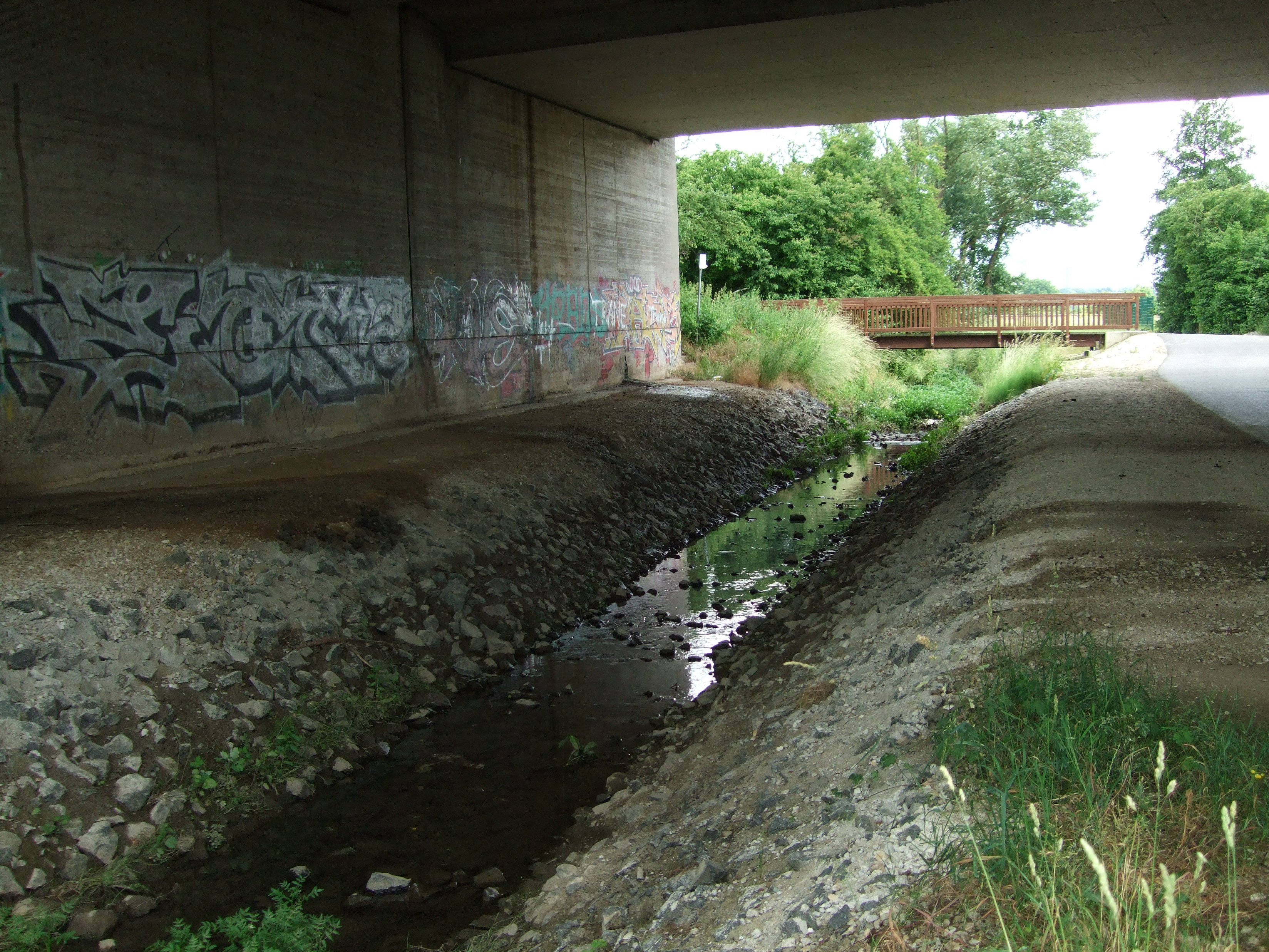 Der Kalbach in Frankfurt-Kalbach